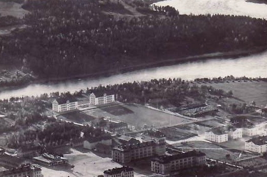 Vy över Norrbottens regemente. I vänster nederkant syns de två så kallade Skidlöparekasernerna, i höger nederkant syns kanslihuset samt tre av de fyra ursprungliga kasernerna vid Norrbottens regemente. De två byggnaderna vid älvstranden är officersbostäder, dock rivna.